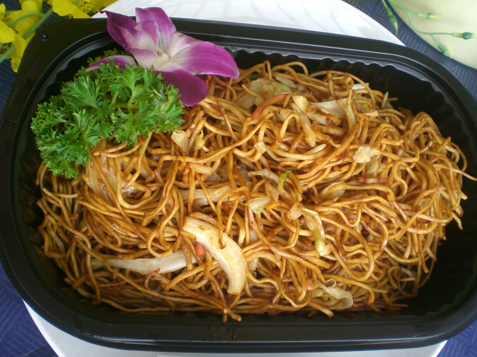 赤鱲角亞洲國際博覽館zh:快餐店豉油皇炒麵